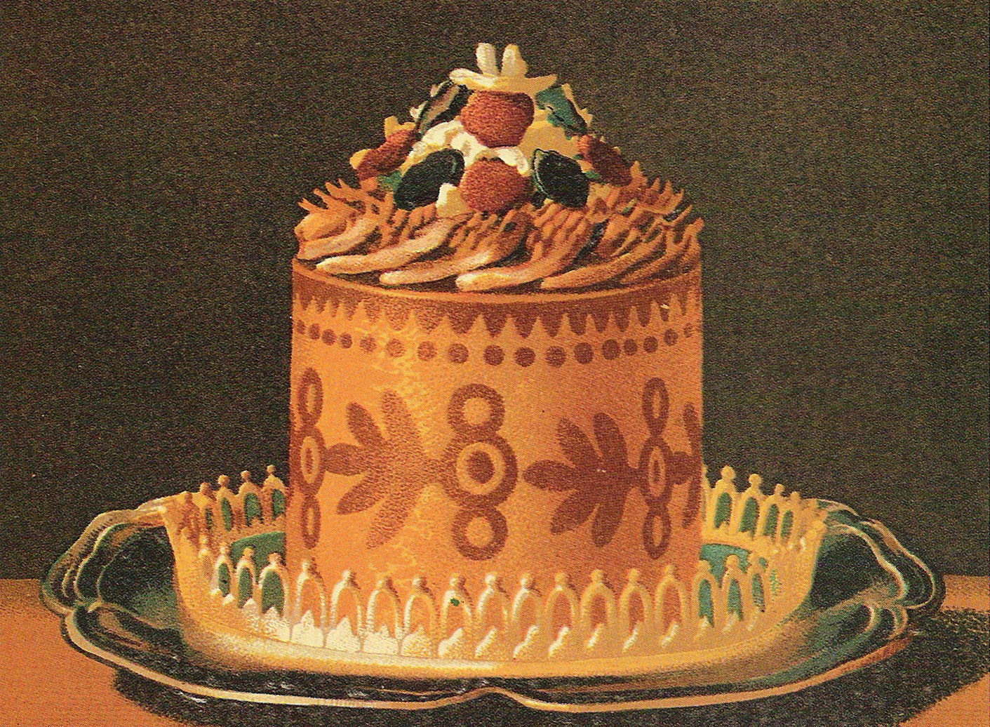 Photographie d'une illustration du « Livre de cuisine » de Jules Gouffé (1867)